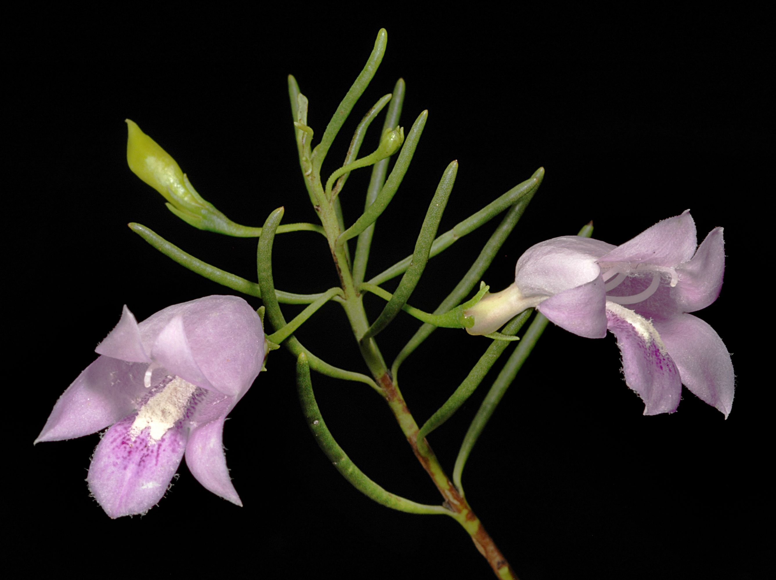 KRT3498